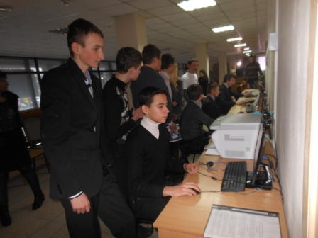 Практичні заняття